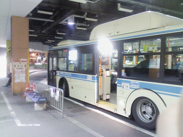 大阪駅前88号系統22時33分発天保山行大阪市バス。 撮影2010年3月27日22時27分